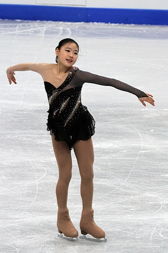 Kim Hae-Jin (Южная Корея) на чемпионате мира по фигурному катанию среди юниоров 2012